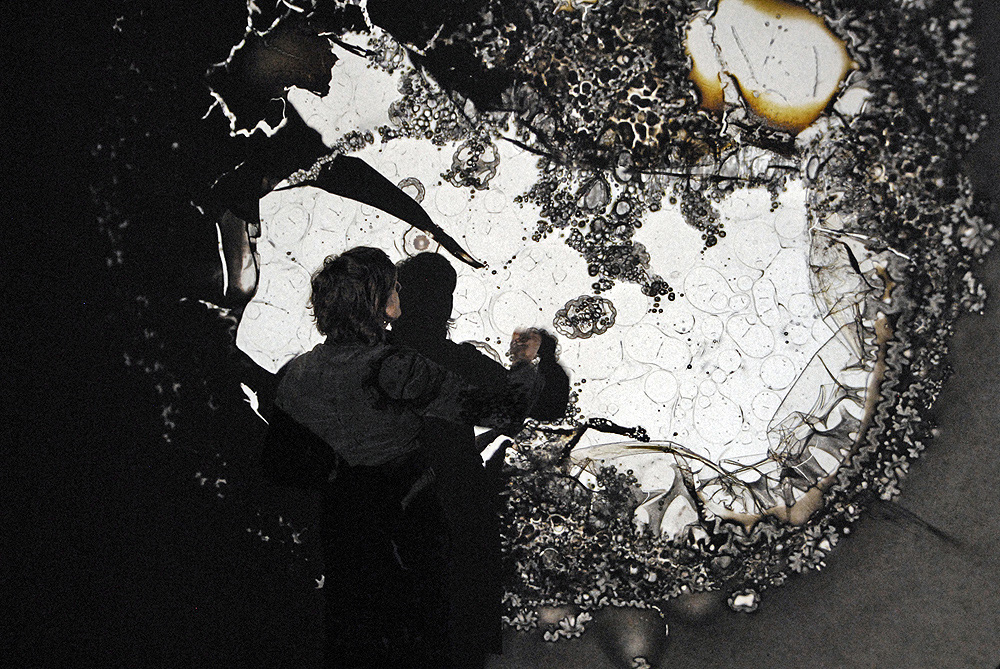 Claus Stolz 2010, detail, slide projection